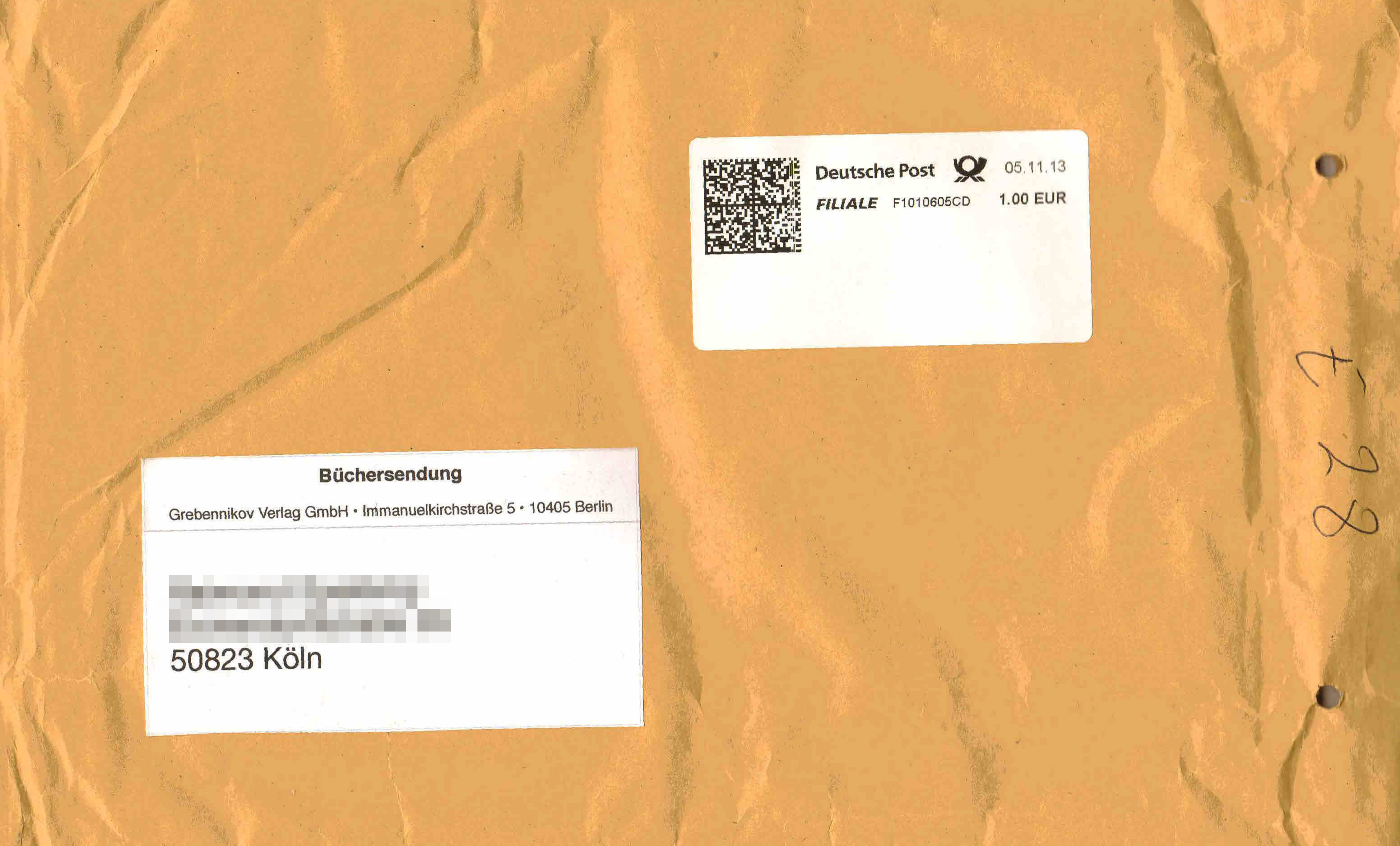 Luftpolsterumschlag für eine Büchersendung, Versand mit der Deutschen Post 2013. Frankiert